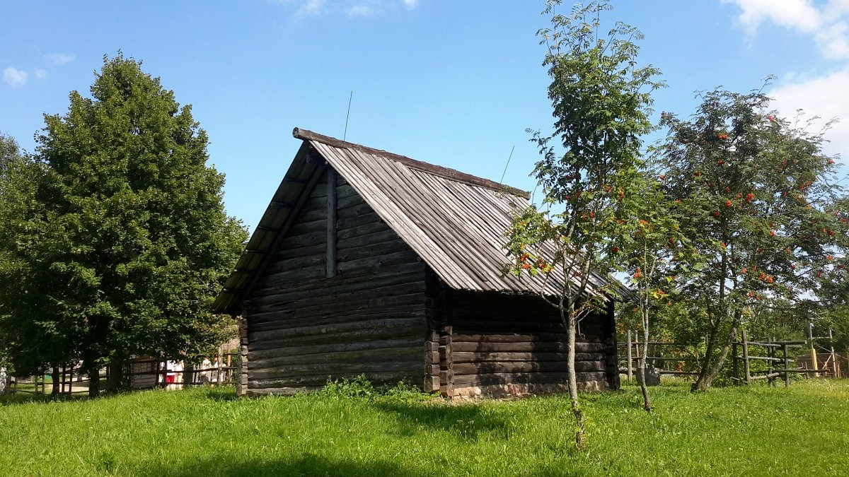 Строчыца. БДМНАБ. Кузня з в. Клочкава